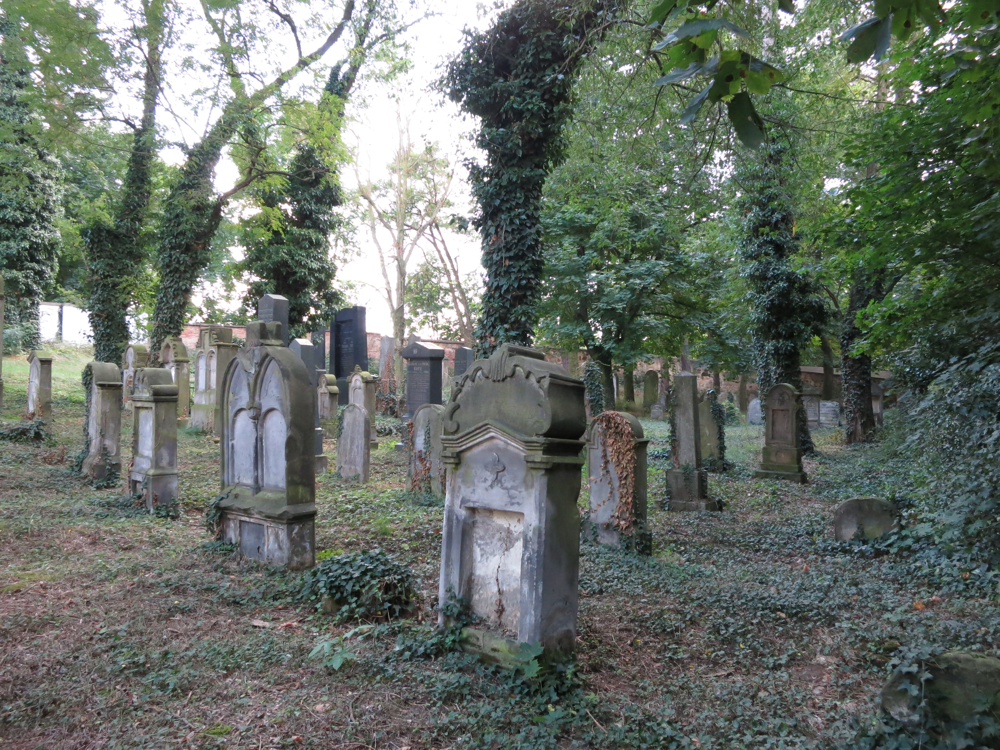 Židovský hřbitov (Zlonice), při silnici směr Beřovice, Zlonice, Zlonice.